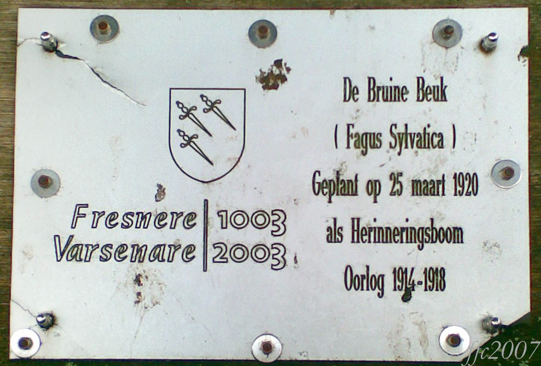 Varsenare Herdenkingsplaat